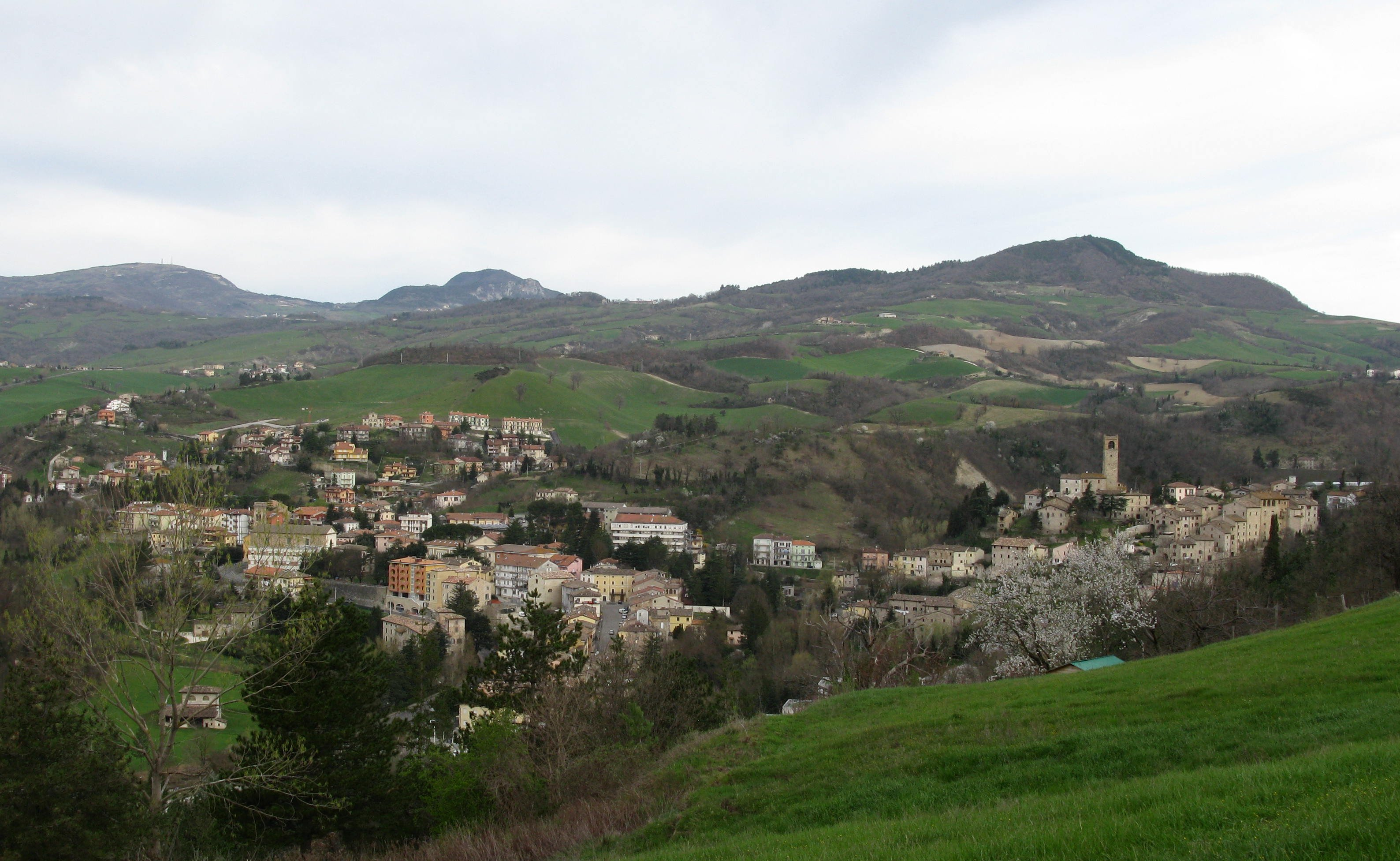 Panorama di Macerata Feltria.